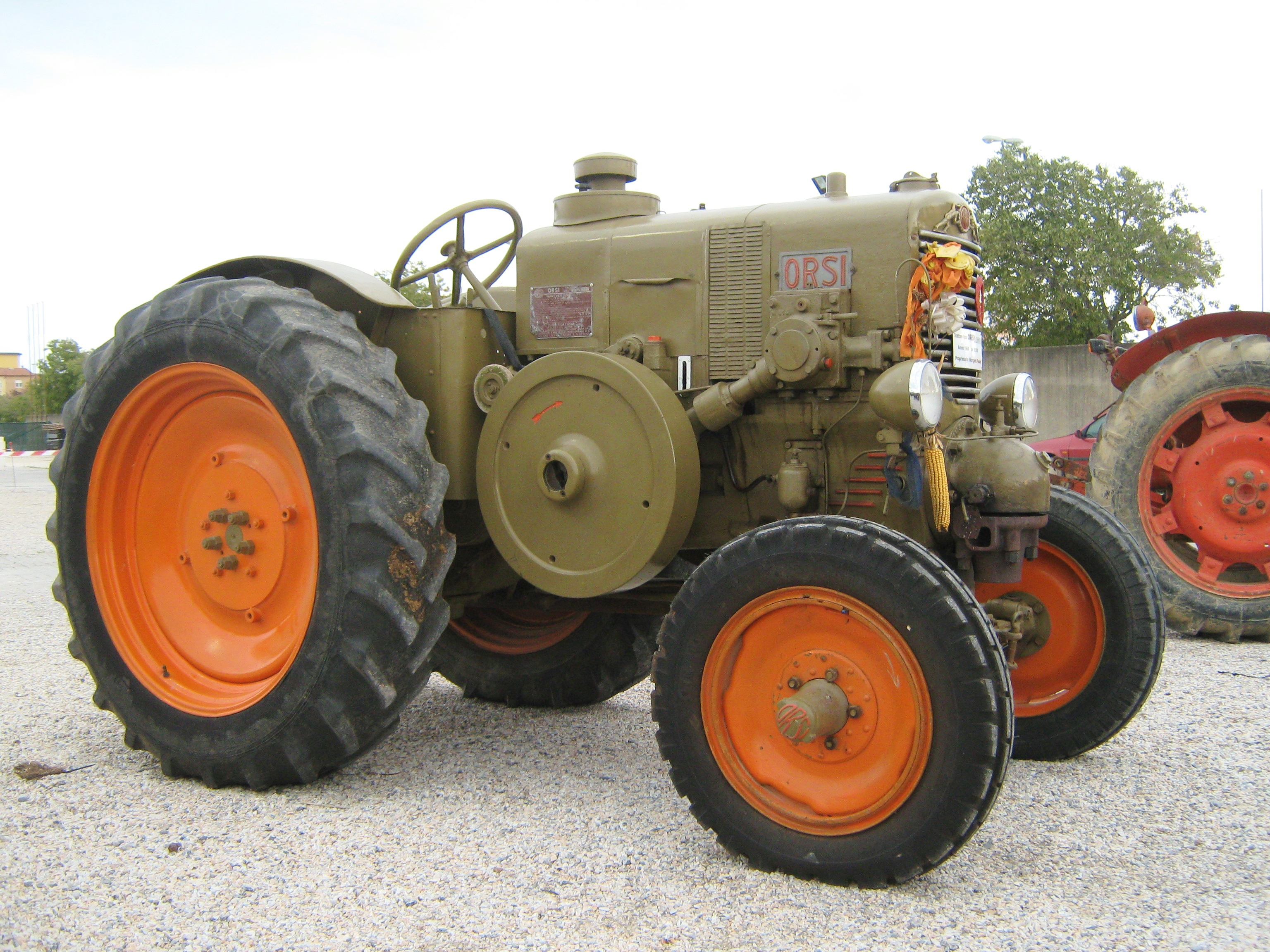 Trattore gommato Orsi esposto all'Expo Model di Venturina (LI), nel 2012.